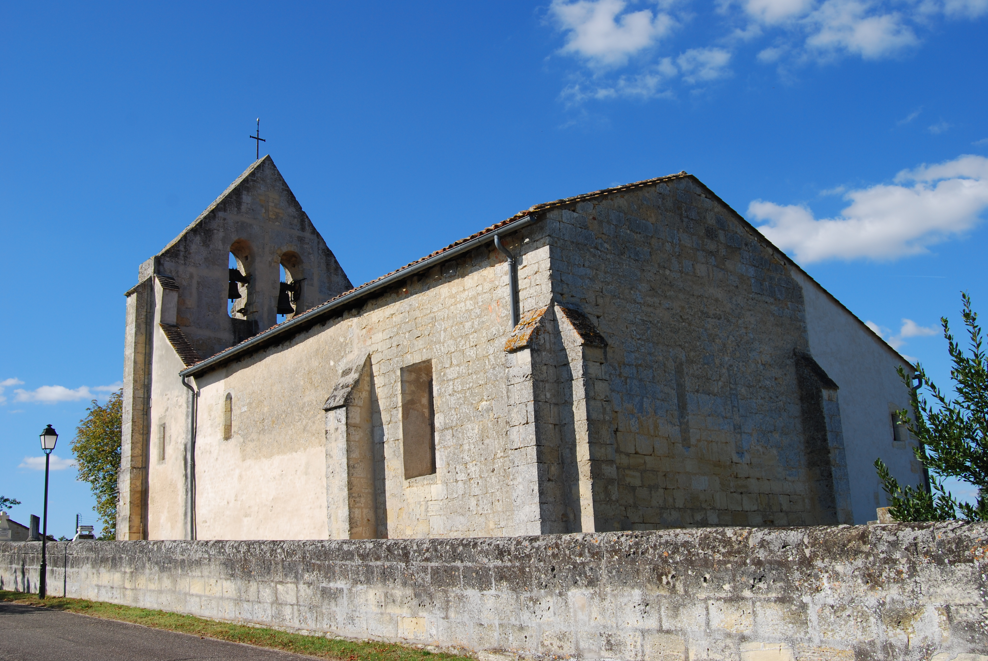 Église Saint-Martin du Pout, (Inscrit, 1987) .